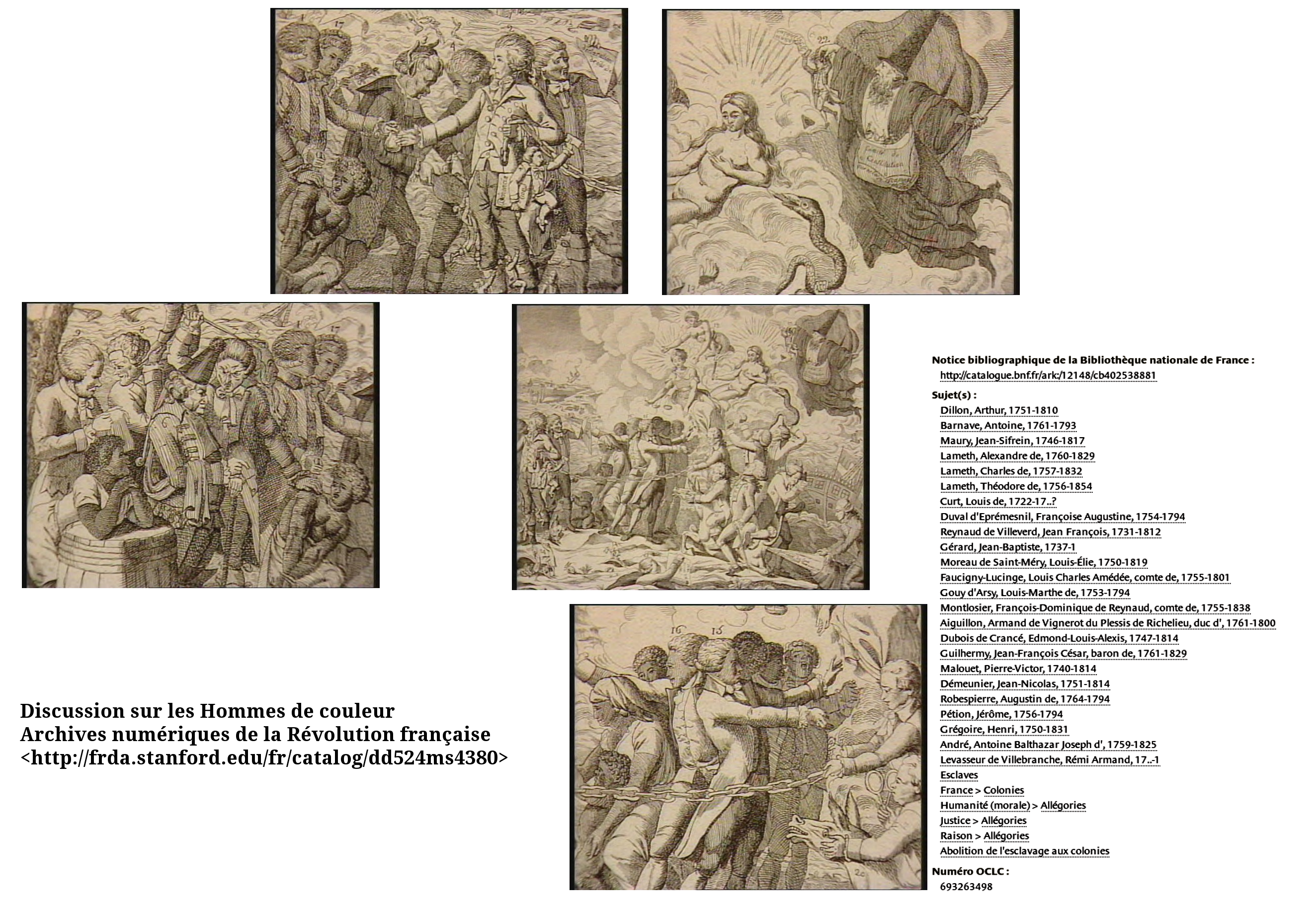 Image reconstituée à partir des élément de : Evénements de la Révolution, Débats législatifs, L'abolition de l'esclavage (4 février 1794), "Discussion sur les Hommes de couleur (estampe)".